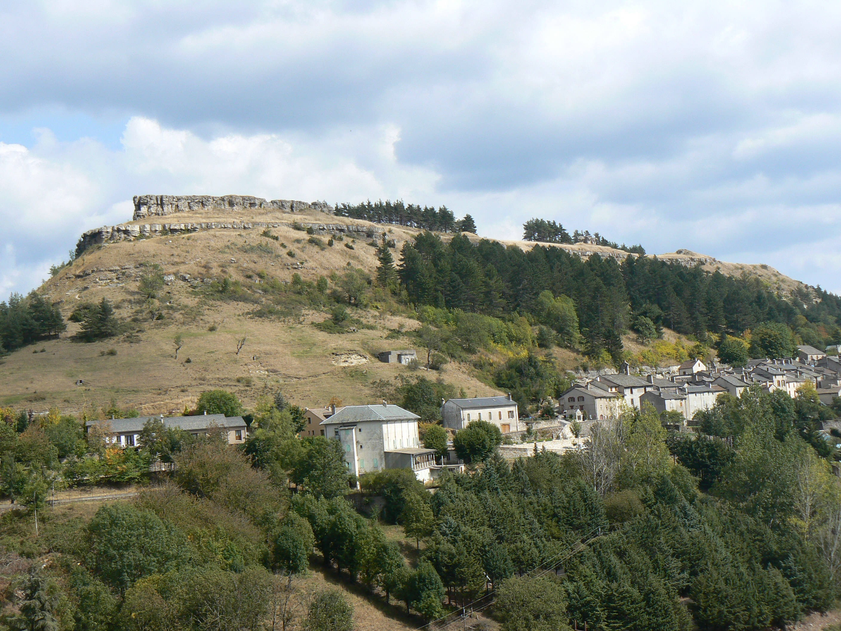 Vue générale de la commune de Barre-des-Cévennes en Lozère